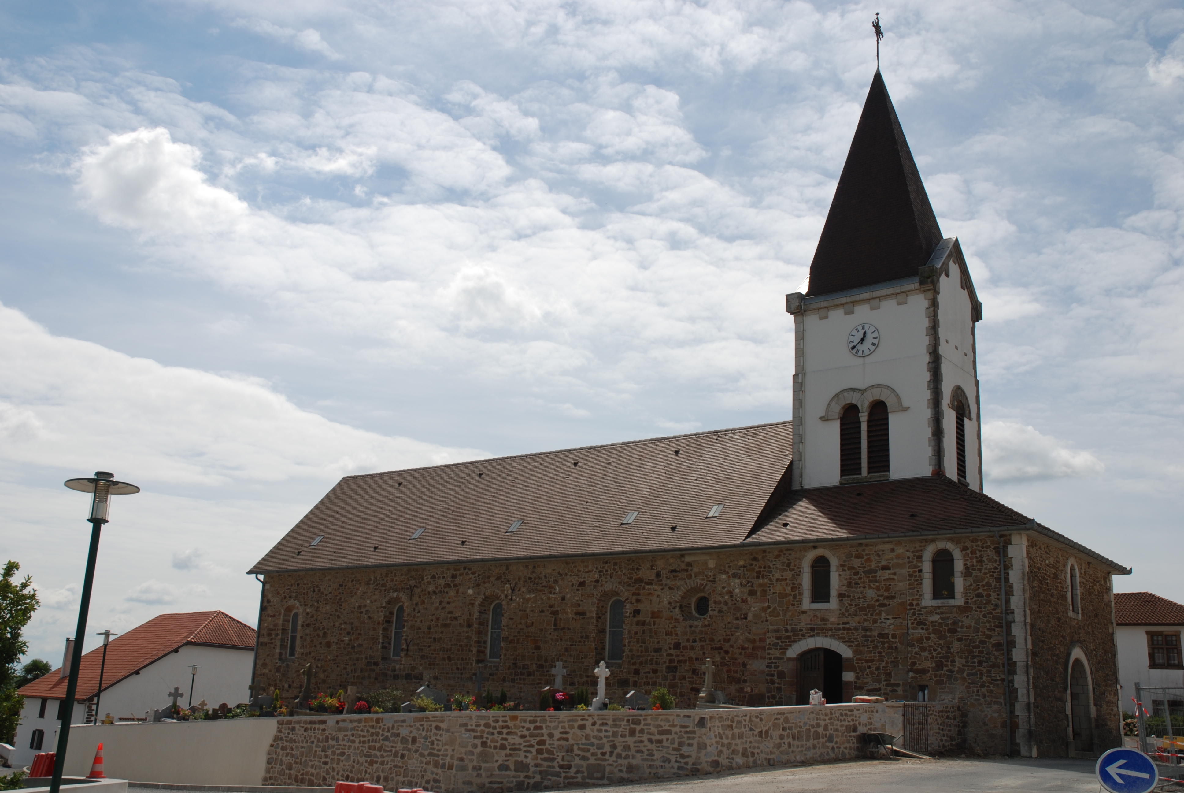 Orègue, l'église Saint-Jean-Baptiste